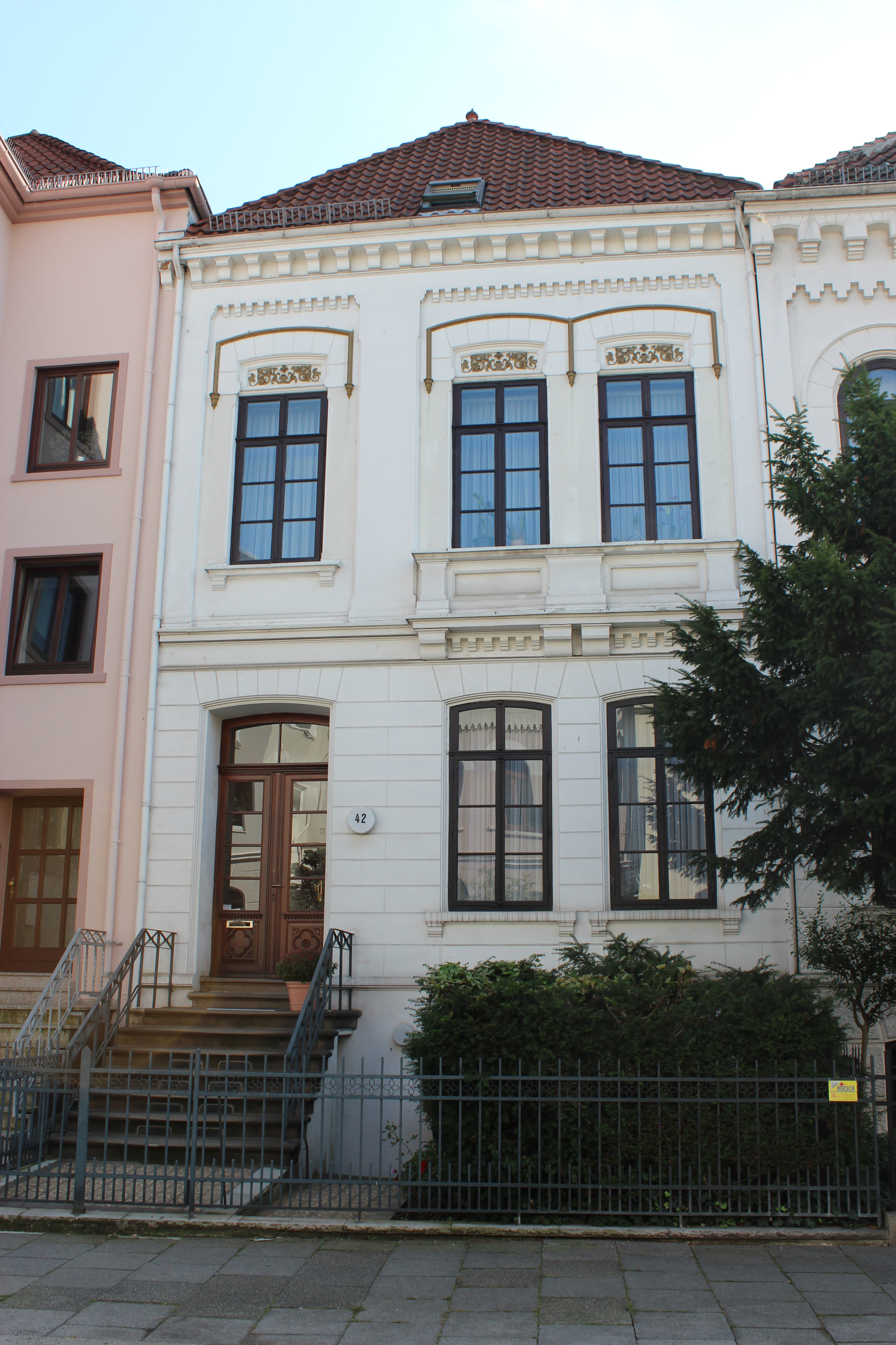 Wohnhaus in Bremen, Fedelhören 42Das abgebildete Objekt ist ein geschütztes Kulturdenkmal in der Freien Hansestadt Bremen, mit der Nr. 0331 beim Landesamt für Denkmalpflege registriert.